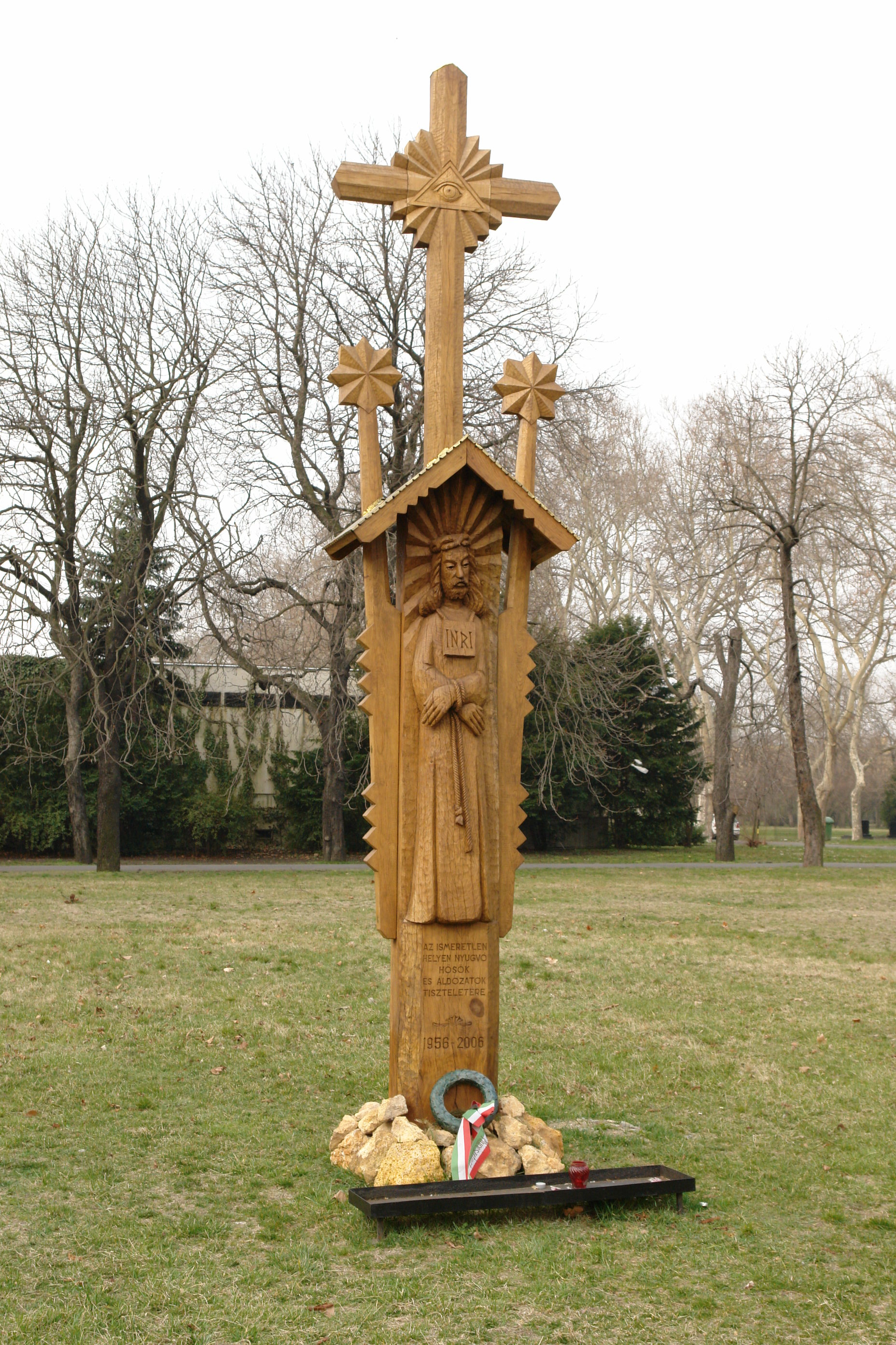 a temető. síremlék